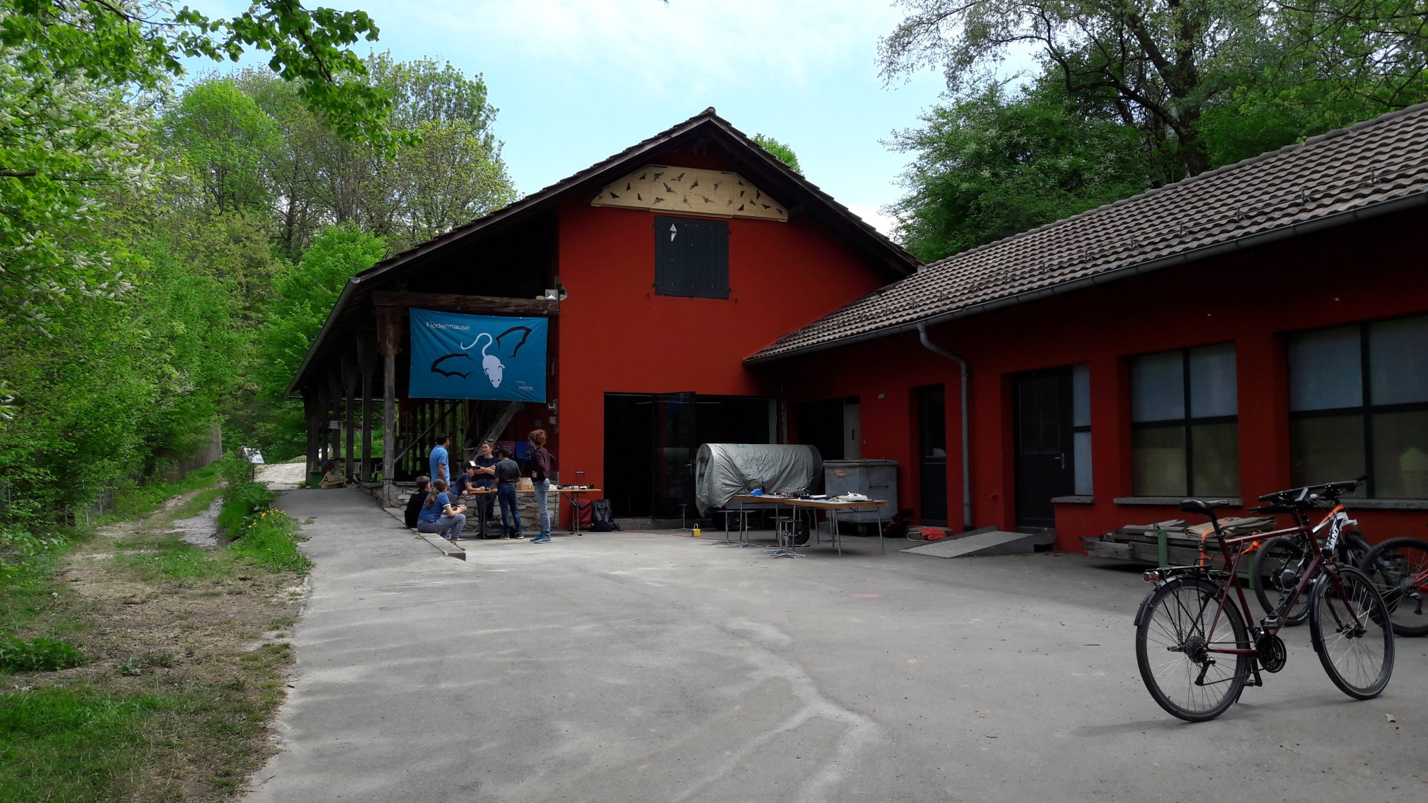 Das Gebäude Hier ist auch die wechselnde Ausstellung plaziert